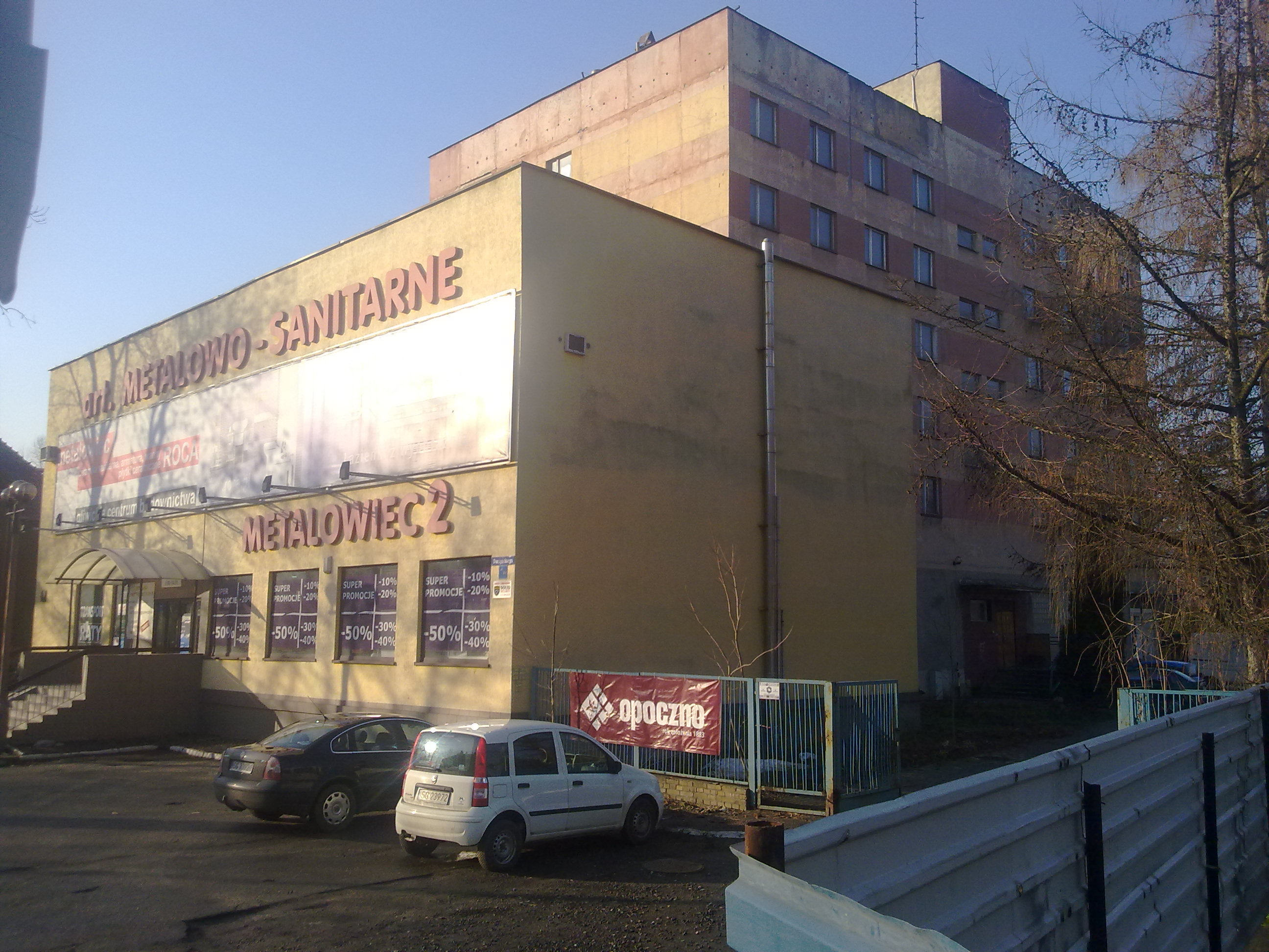 Gliwice - dawne kasyno i hotel brygady WOP